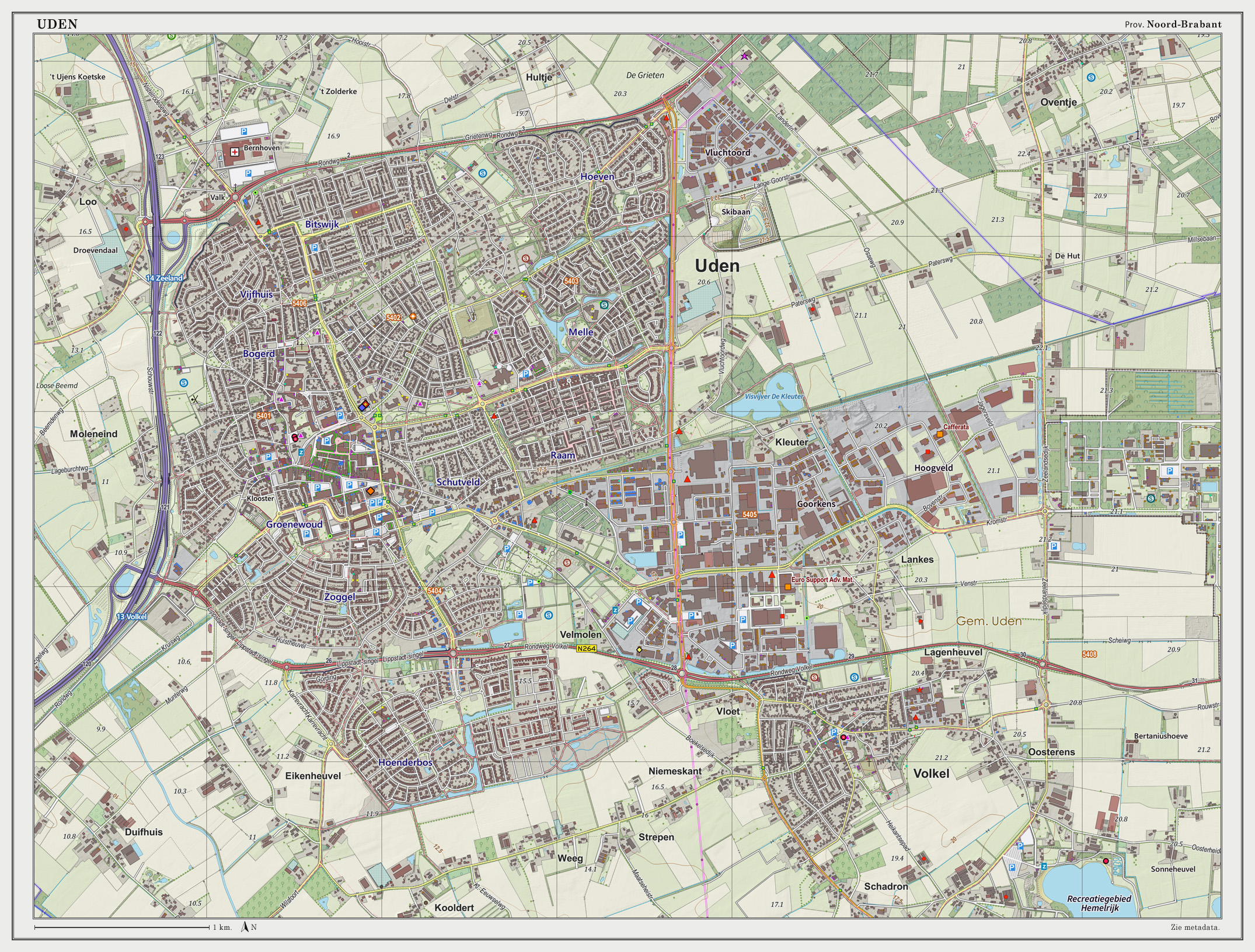 Topografische kaart van Uden (woonplaats). Resolutie: 300 pixels/km. Kaartbeeld samengesteld uit de open geodata van de Top10NL en Top25namen (Basisregistratie Topografie, Kadaster), Creative Commons BY licentie. Gebouwvlakken uit open geodata BAG extract. Wegen uit de OpenStreetMap. Reliëfschaduw uit de Actuele Hoogtekaart AHN2. Samenstelling en kleurenschema: Jan-Willem van Aalst, met QGIS2. Zie ook de Legenda.